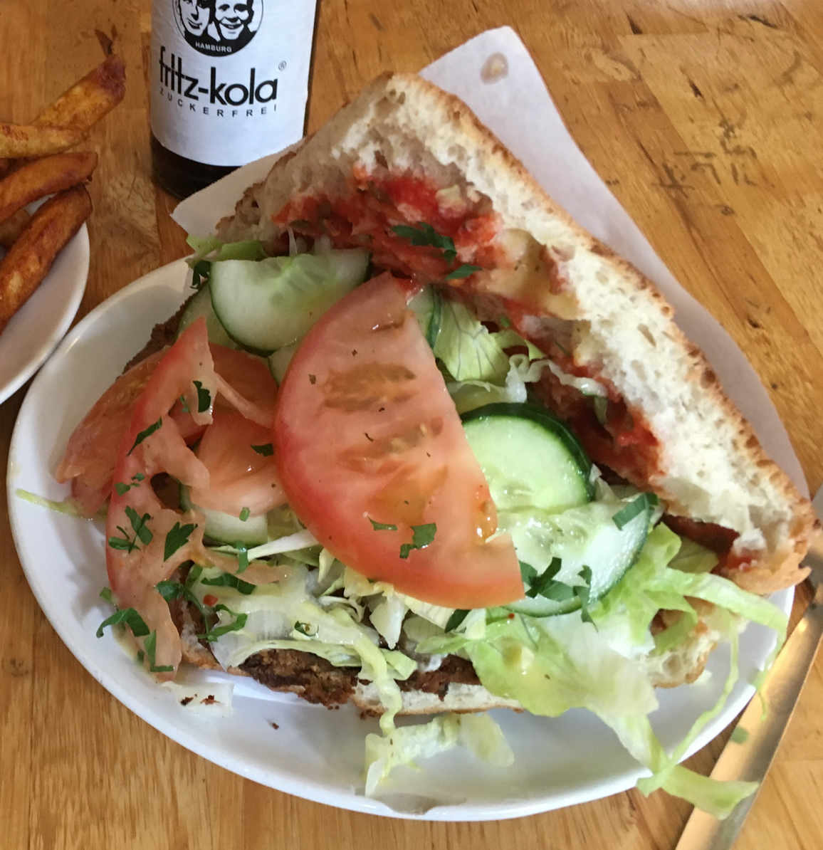 Vegan Doner Kebab at Vöner